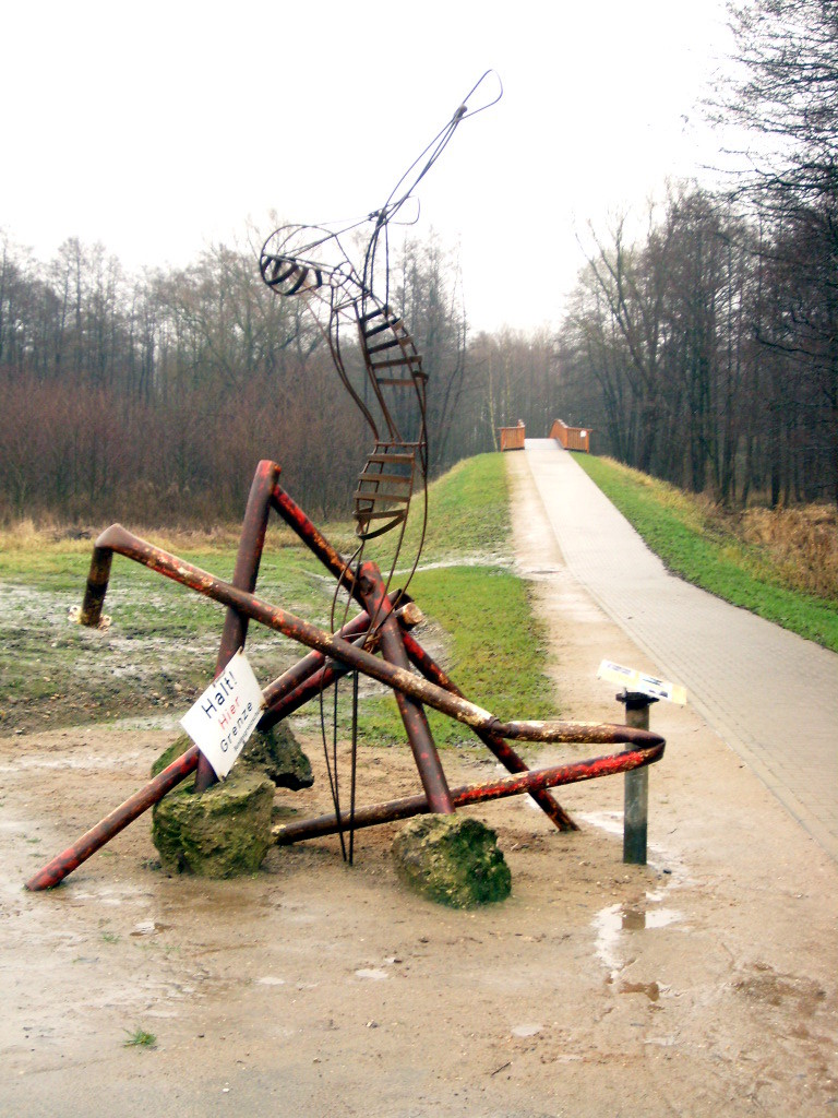 Die 2008 für Fußgänger und Radfahrer erbaute Brücke zwischen der Gemeinde Groß Sarau in Schleswig-Holstein und Schattin in Mecklenburg-Vorpommern über die Wakenitz bei Nädlershorst. Davor die Skulptur Grenzen überwinden des in Schattin ansässigen Bildhauers Claus Görtz, die 2008 aus den bis dahin dort befindlichen Schlagbäumen der Innerdeutschen Grenze auf den Brückenrampen der ehemaligen Brücke entstand. Die neue Brücke wurde aus Mitteln der Metropolregion Hamburg hergestellt.